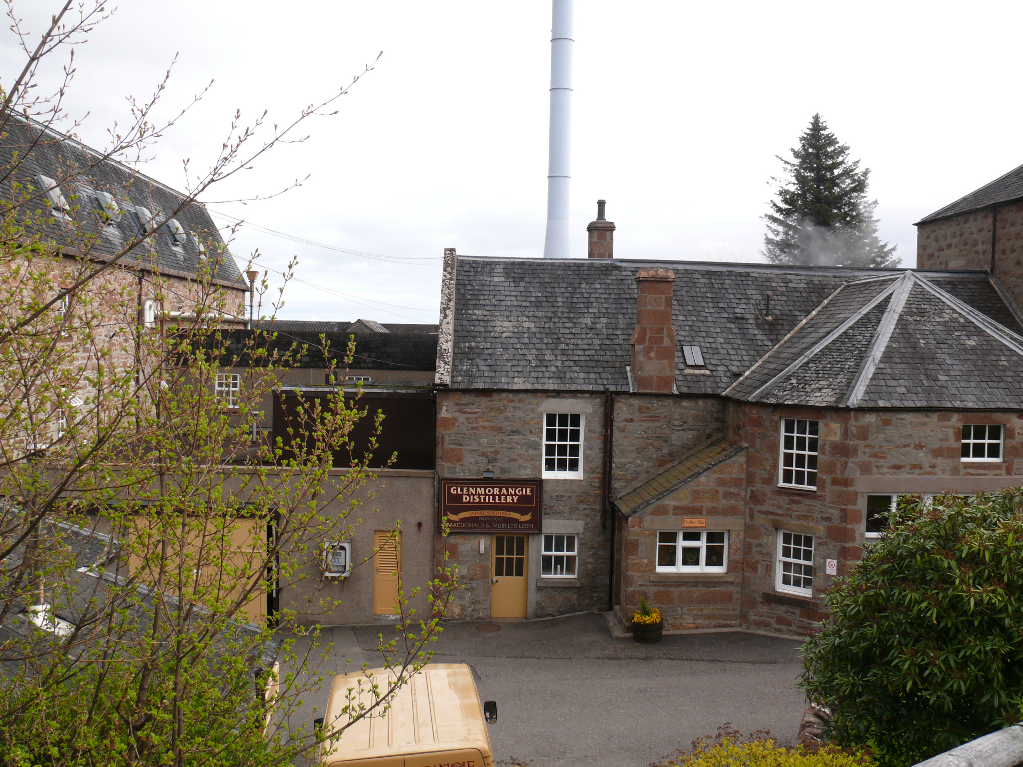 Glenmorangie Distillery